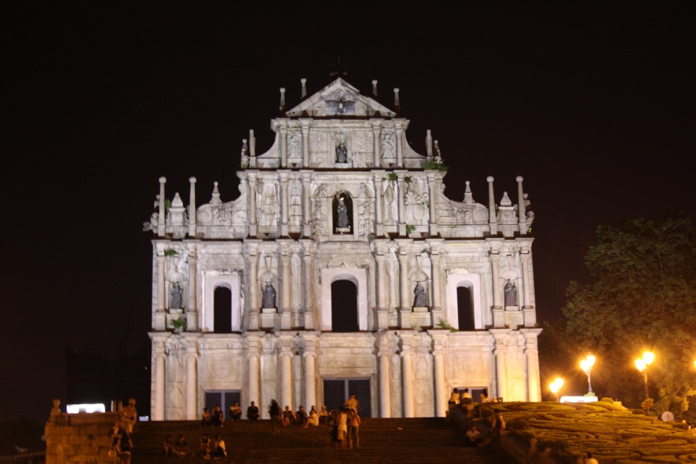 St. Paul-Macau